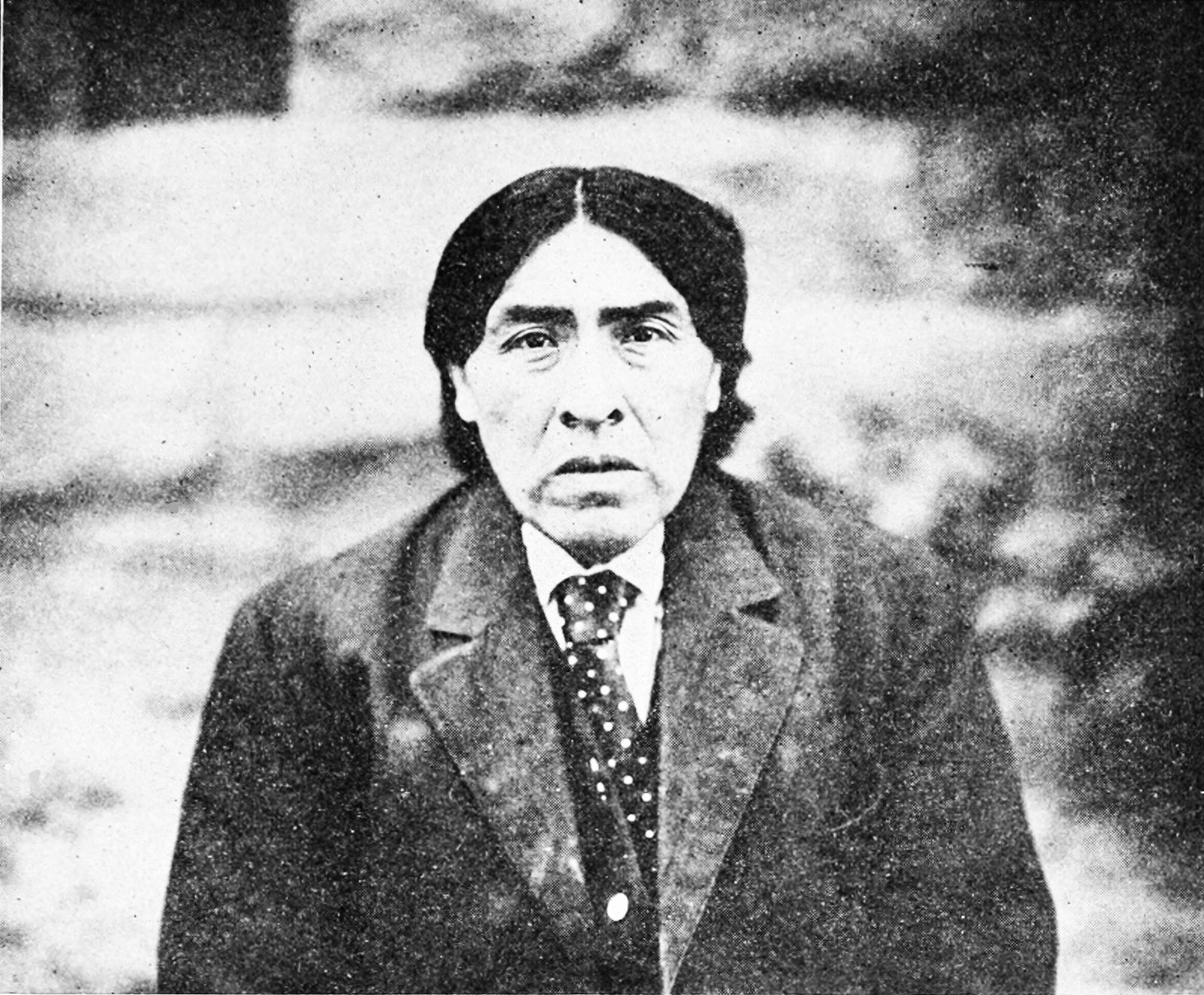 Ishi at present time (1915)